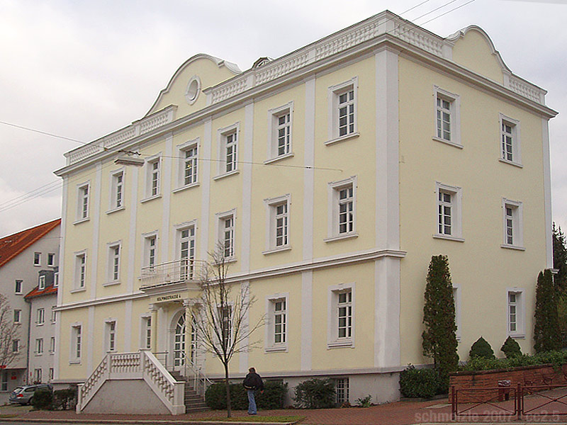 Ehemaliges Sommerhaus des Deutschen Ordens (später: Zwirnfabrik Ackermann) in Heilbronn-Sontheim